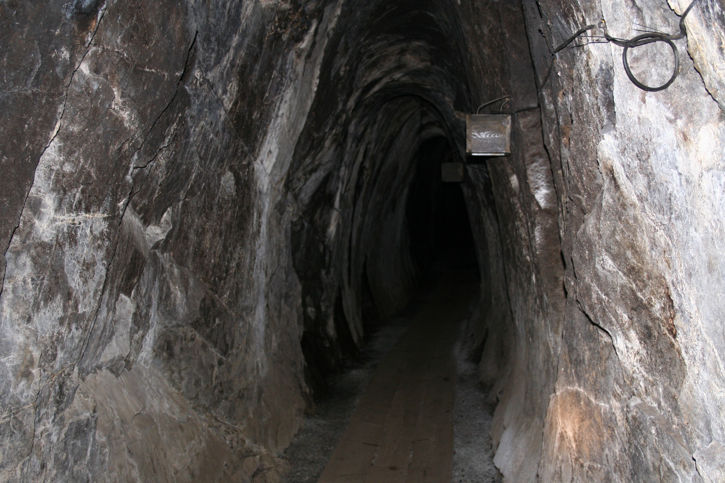 Fyrsettingsstoll, slik ser en stoll drevet ved hjelp av fyrsetting ut.